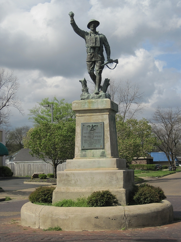 Helena, Arkansas